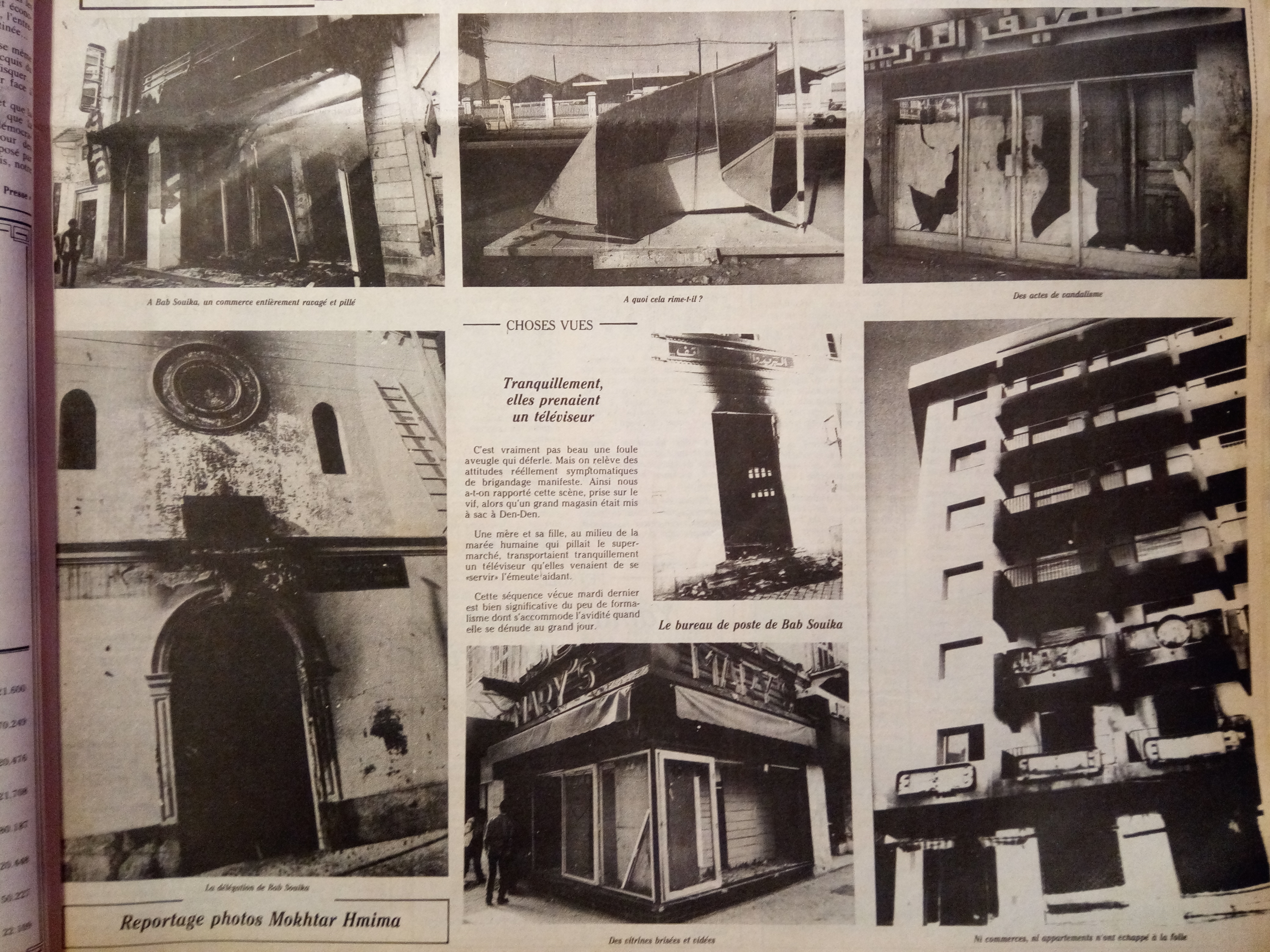 Photo Émeutes du pain 6 jan 1984